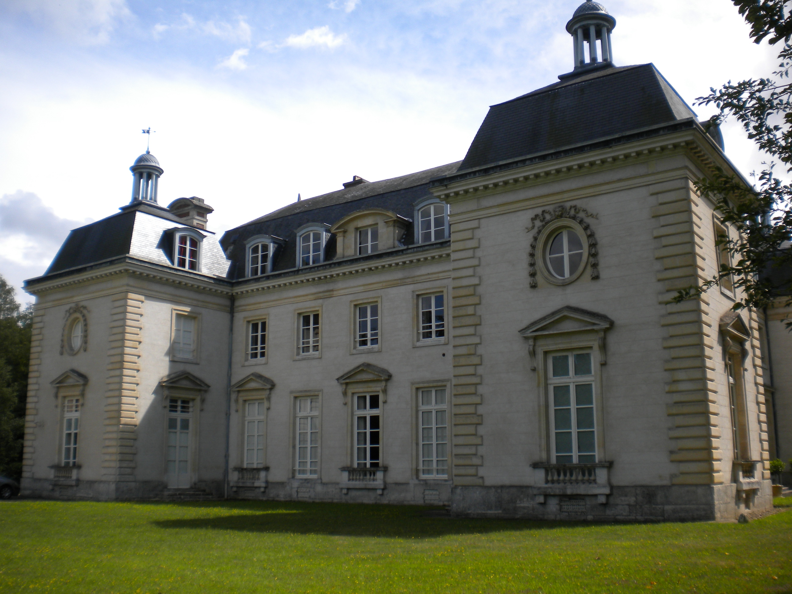 Construit par Jacques Denis Antoine en 1783